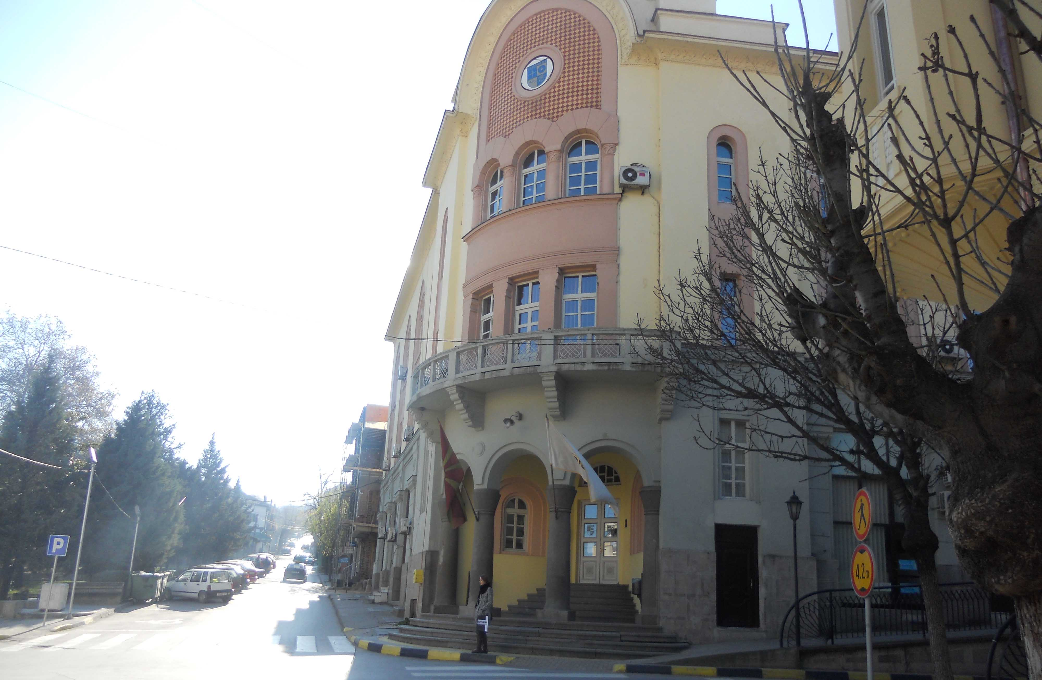 Собрание на Општина Струмица